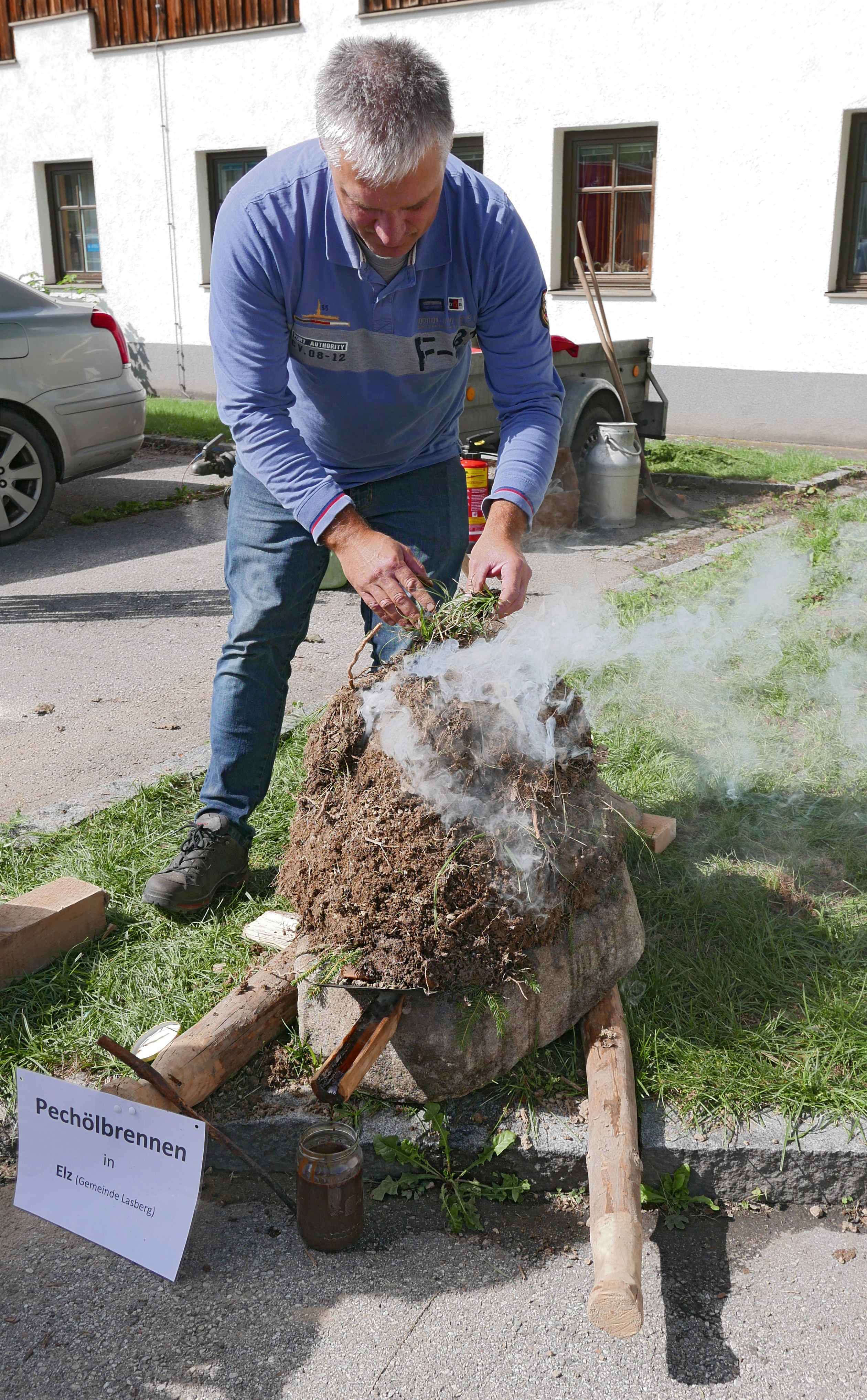 Ortsbildmesse Ternberg 2019: Vorführung von Pechölbrennen mit einem trnsportablen Pechölstein (Elz, Gemeinde Lasberg)